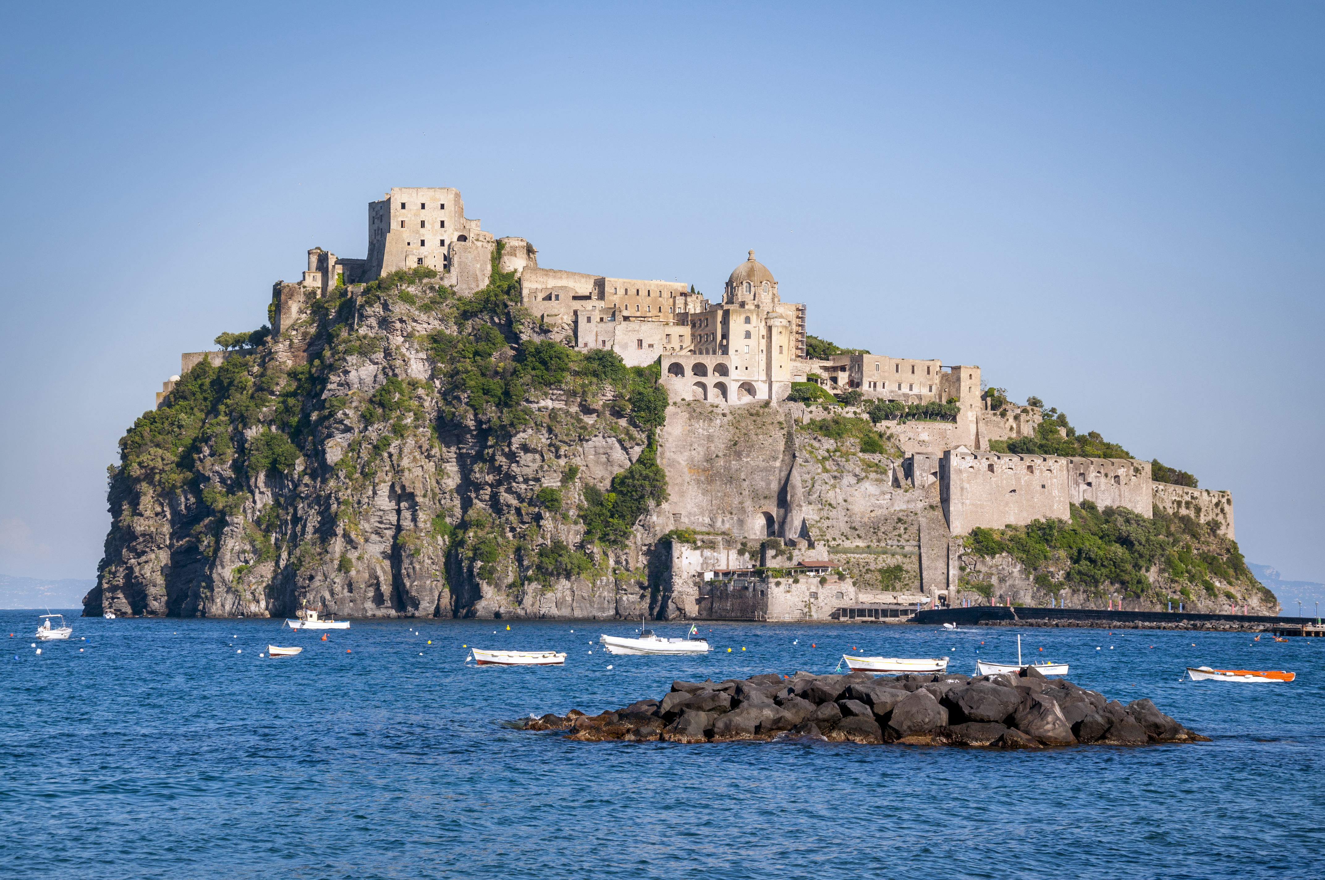 Castello Aragonese (Ischia) This is a photo of a monument which is part of cultural heritage of Italy.